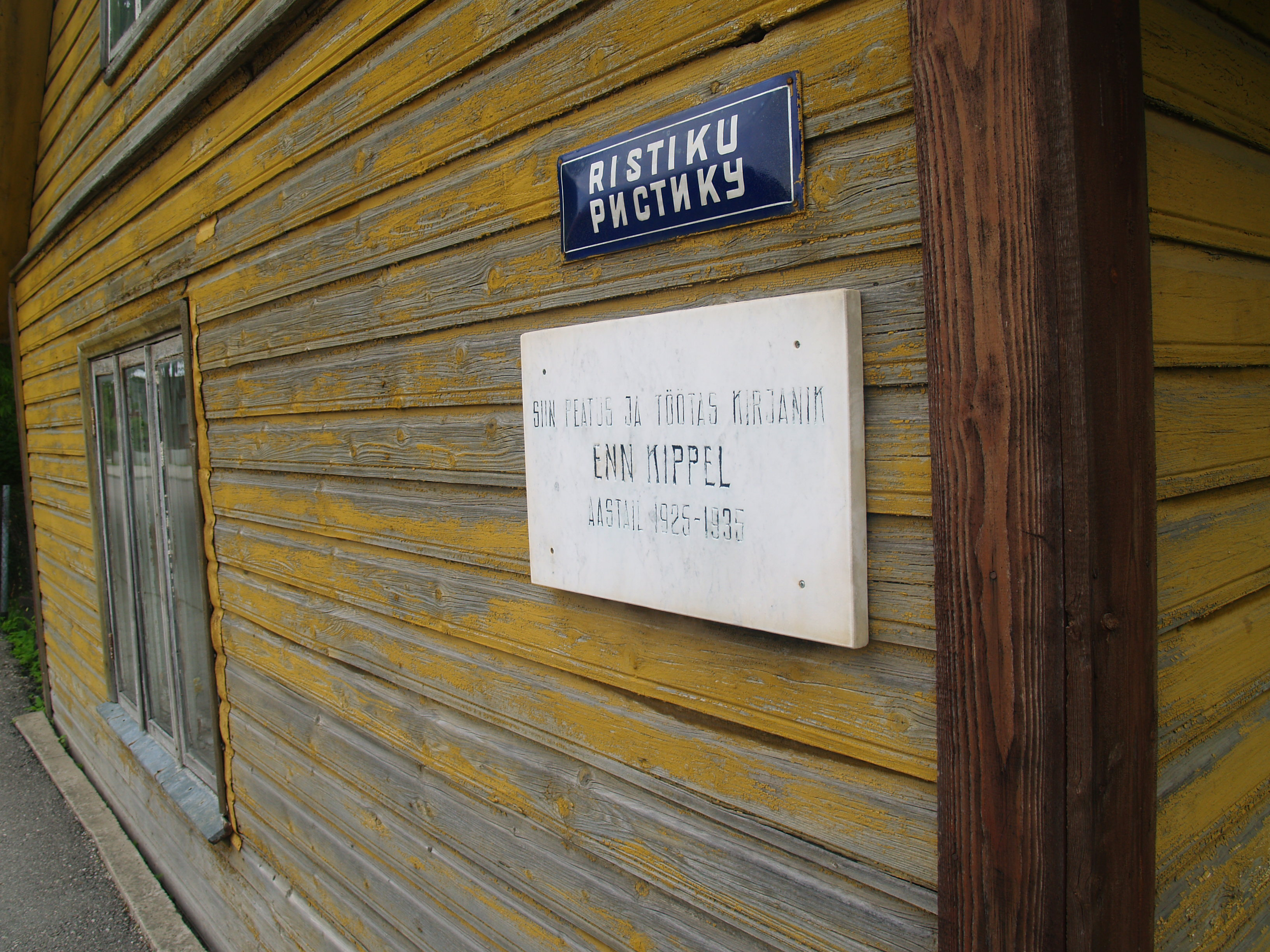 Jõgeva linna vaated